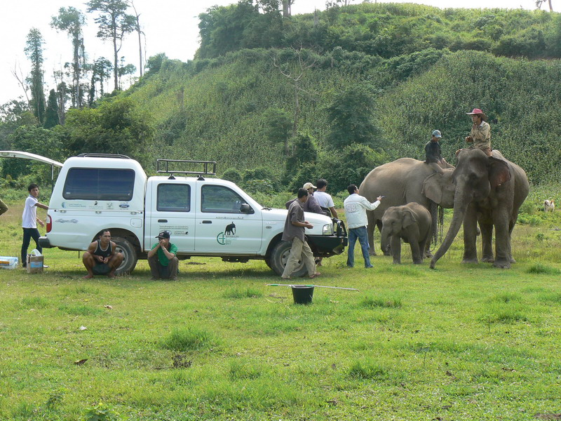 Mobile Vet Unit in Laos